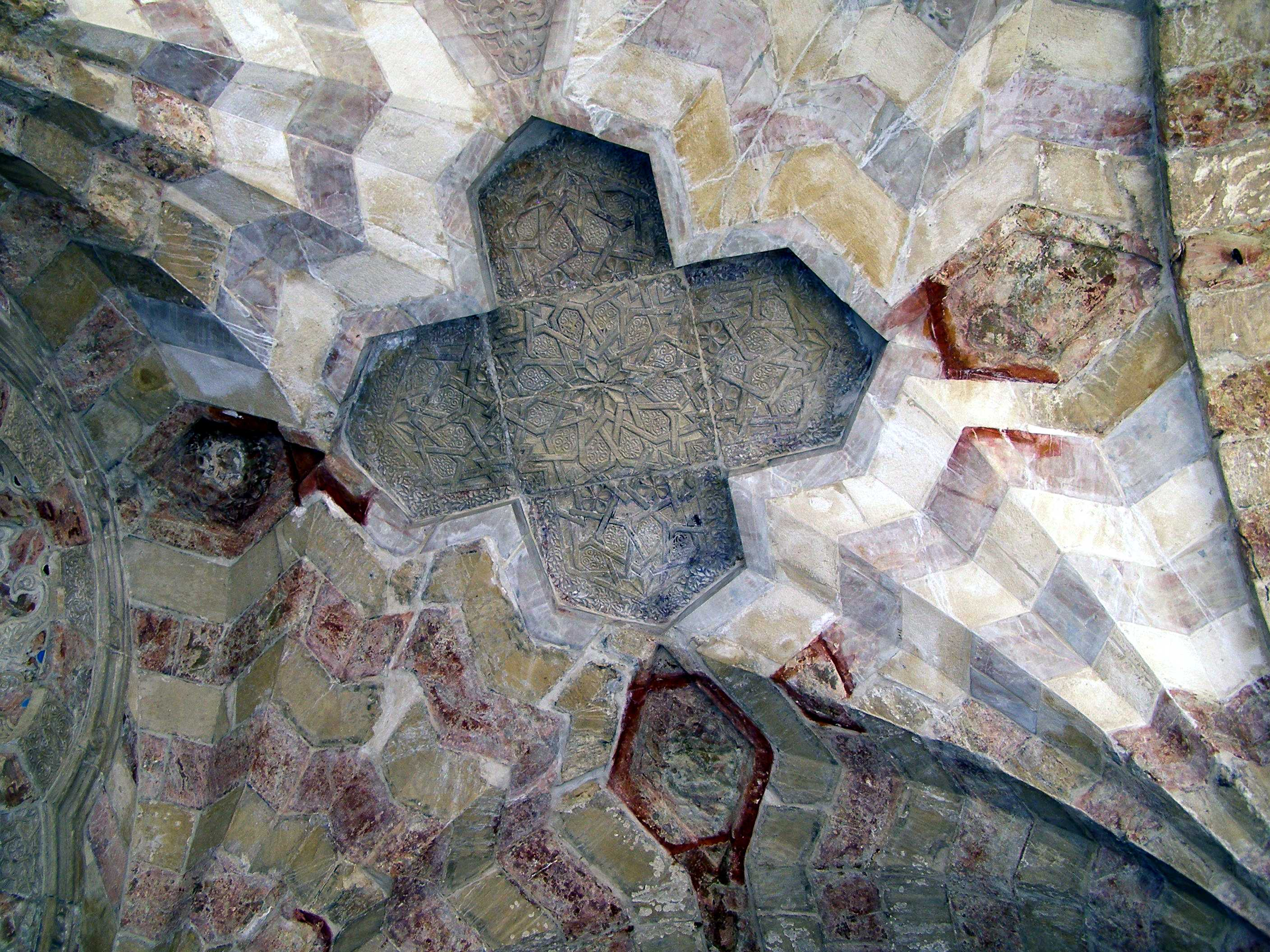 Temple Mount, Jerusalem Madrassat Al Ashraffiyya